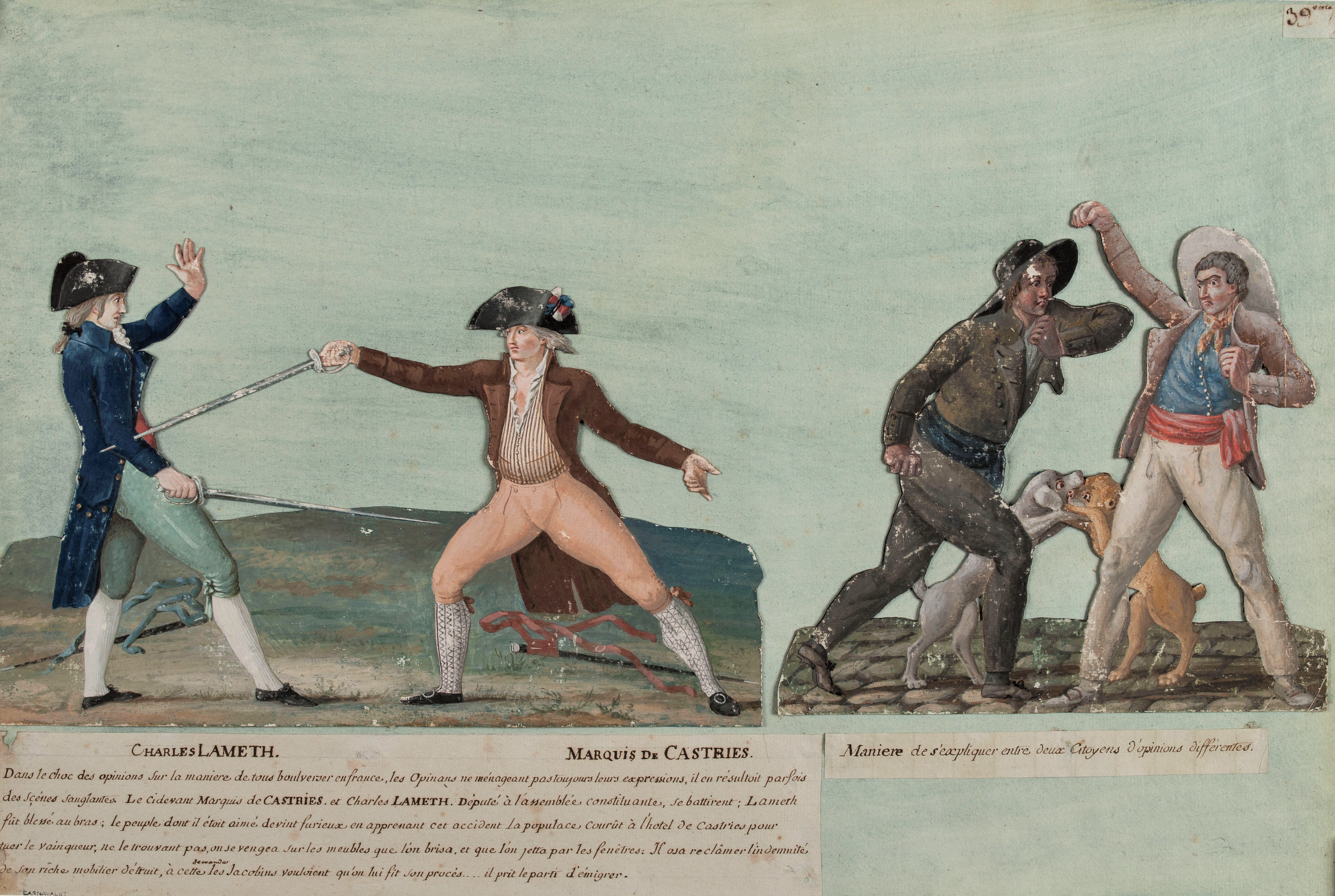 « Duel de Charles de Lameth et du marquis de Castries, le 12 novembre 1790 ». Gouache sur carton, vers 1790, Paris, musée Carnavalet.